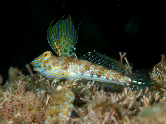 ヒメテグリ Minysynchiropus kiyoae